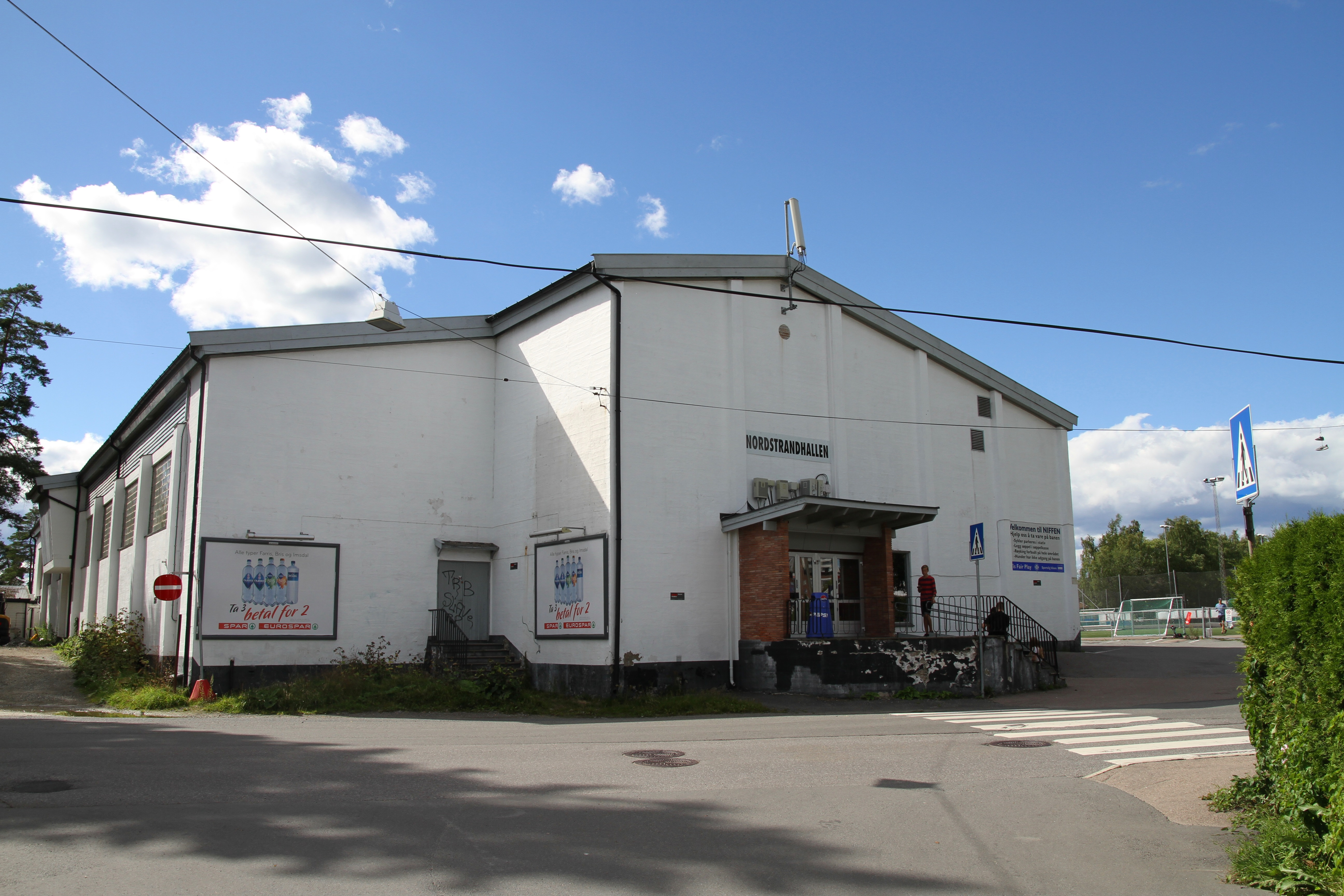 Nordstrandhallen i Oslo.